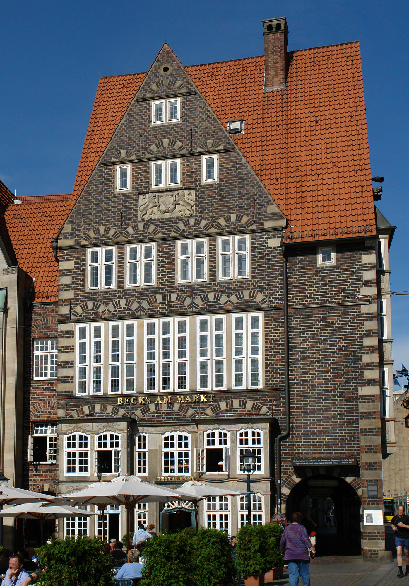 Rathscafé, Deutsches Haus in Bremen, Am Markt 1.Das abgebildete Objekt ist ein geschütztes Kulturdenkmal in der Freien Hansestadt Bremen, mit der Nr. 0068 beim Landesamt für Denkmalpflege registriert.